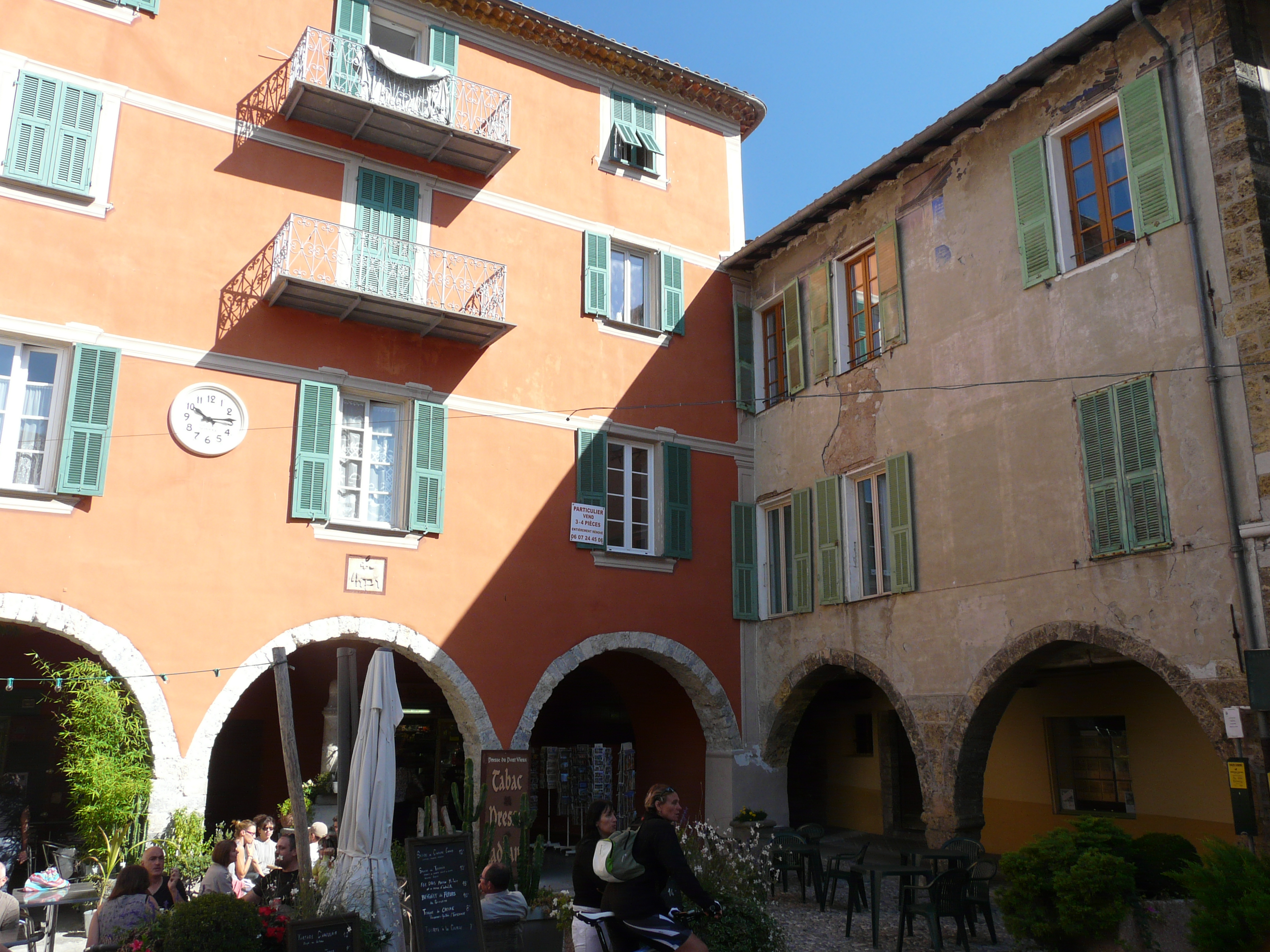 Maisons à arcades place St-Nicolas à Sospel .